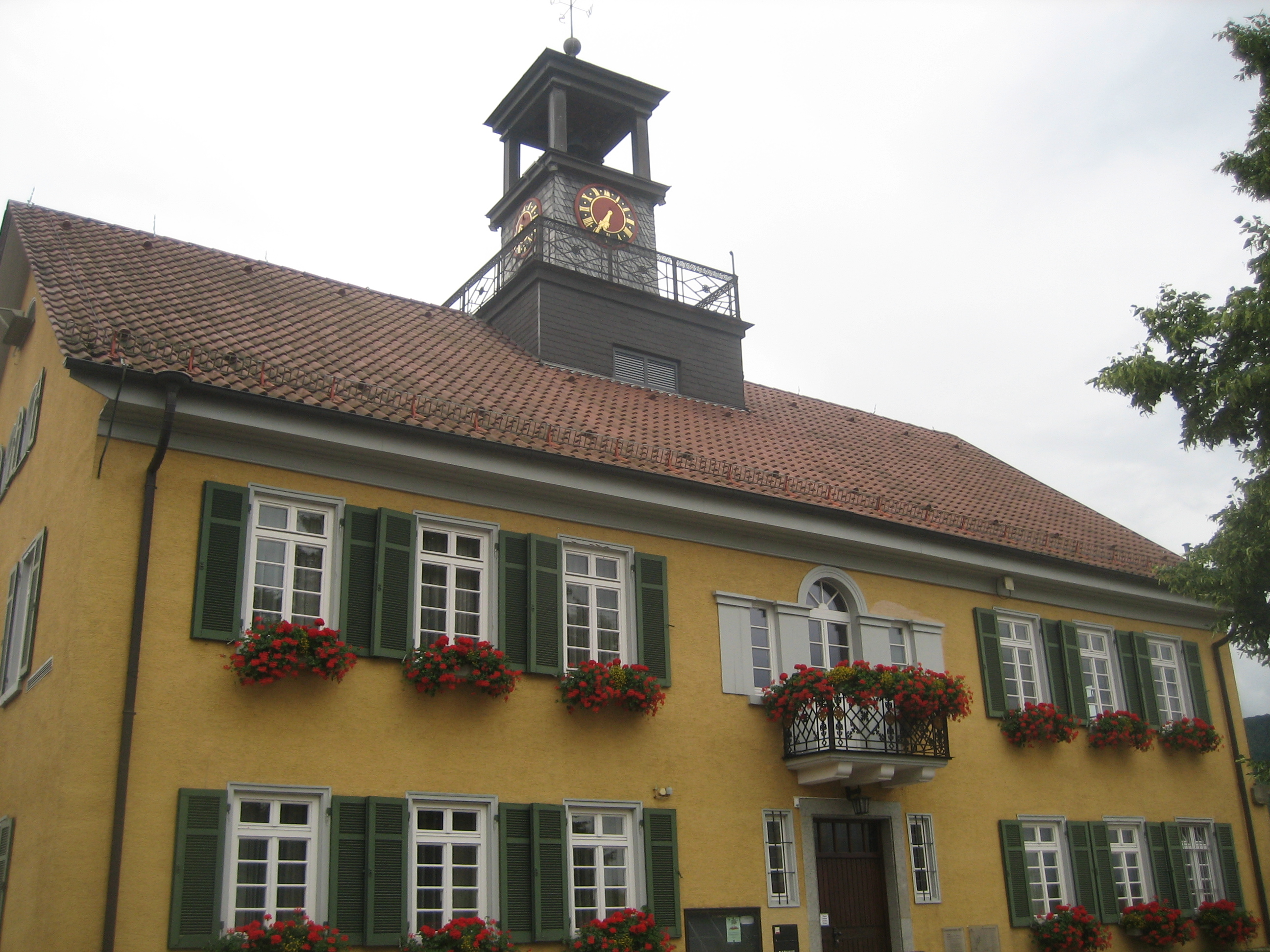 Rathaus von Owen (Kreis Esslingen) Baden-Württemberg